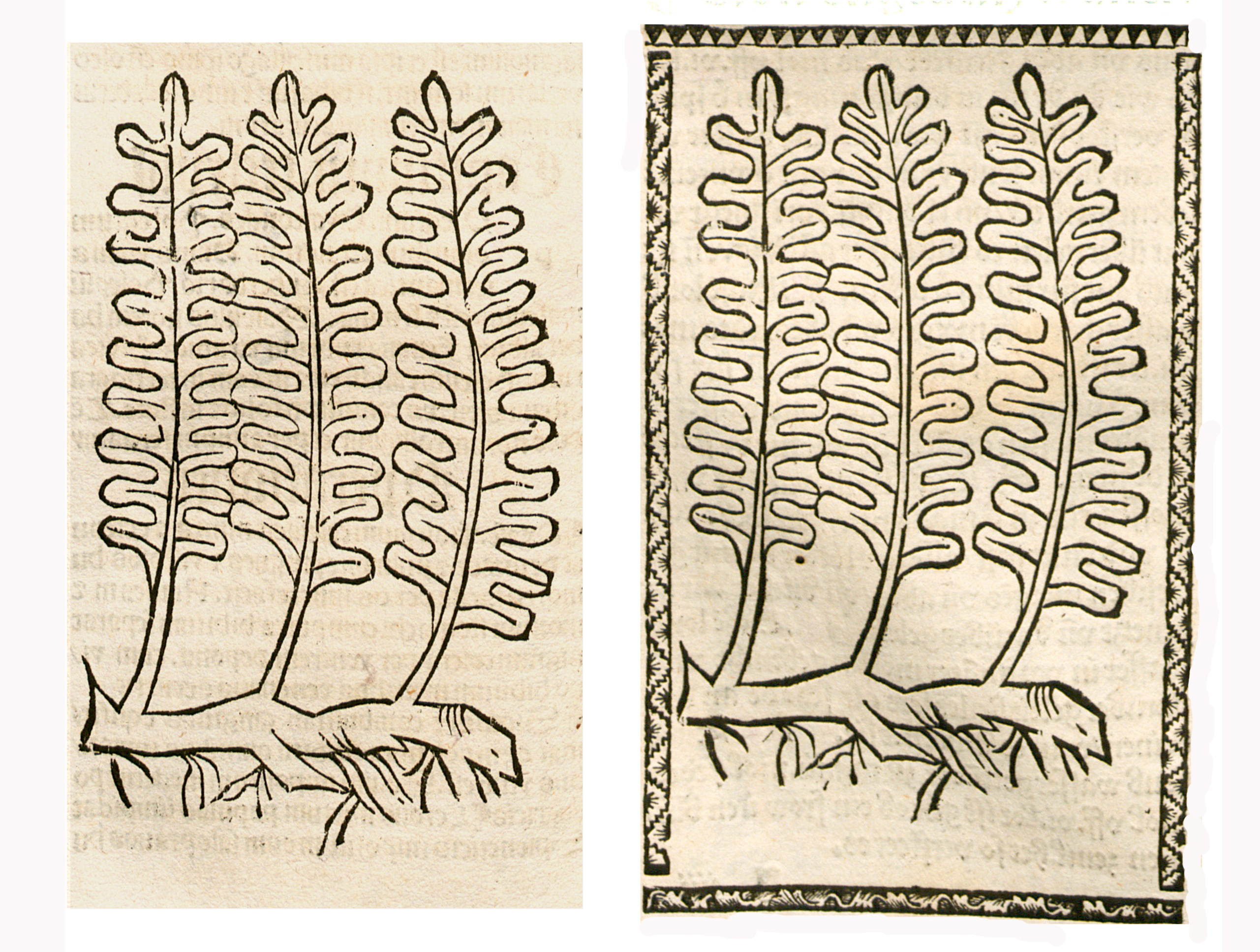 Abbildung von: Engelsüss